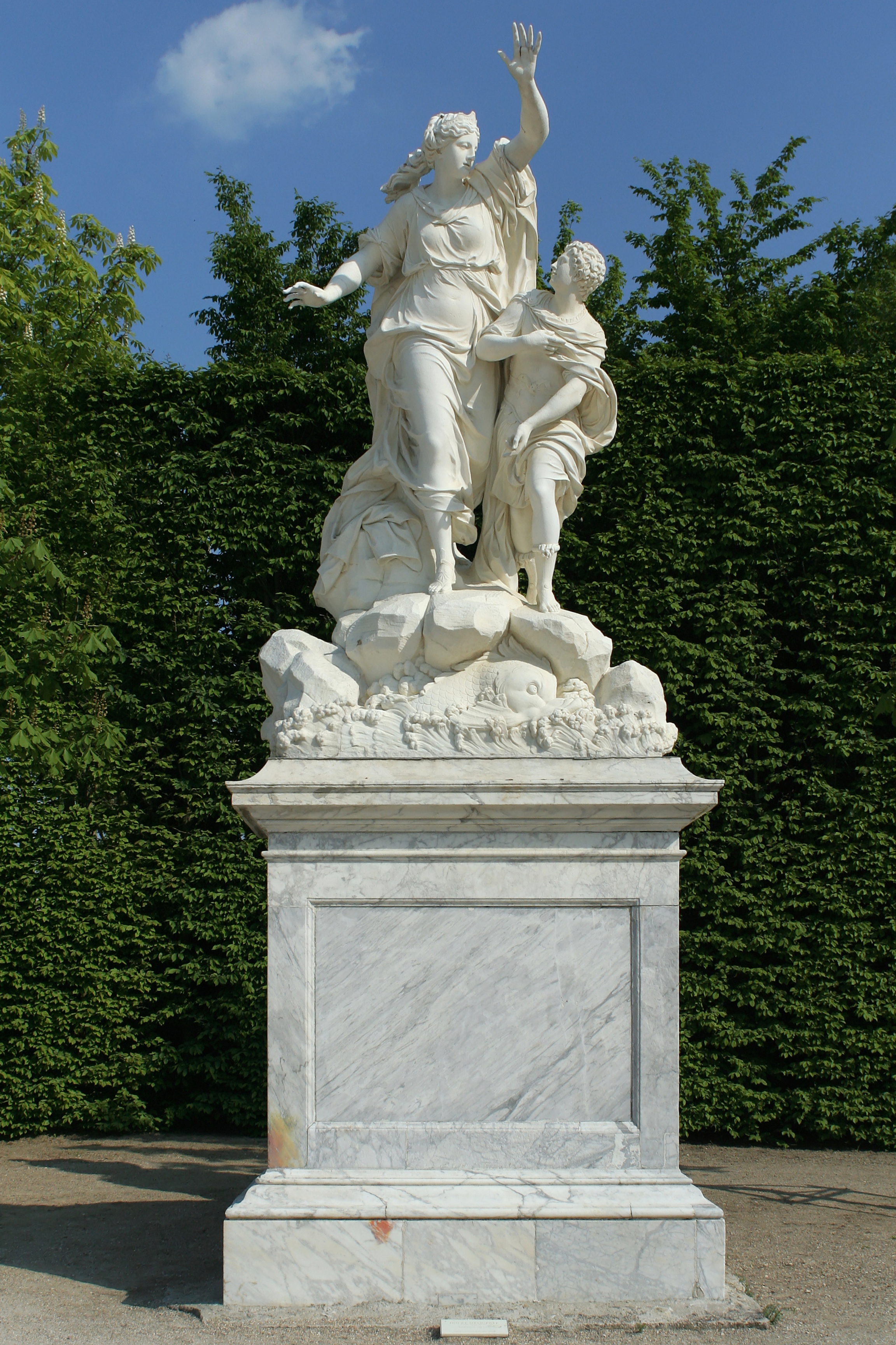 Parc de Versailles, demi-lune du bassin du Char-d'Apollon. Ino frappée de folie par Junon se jetant dans la mer avec son fils Melicerte, par Pierre Granier, 1686-1691, h. 3 m, marbre. inv1850n°9138